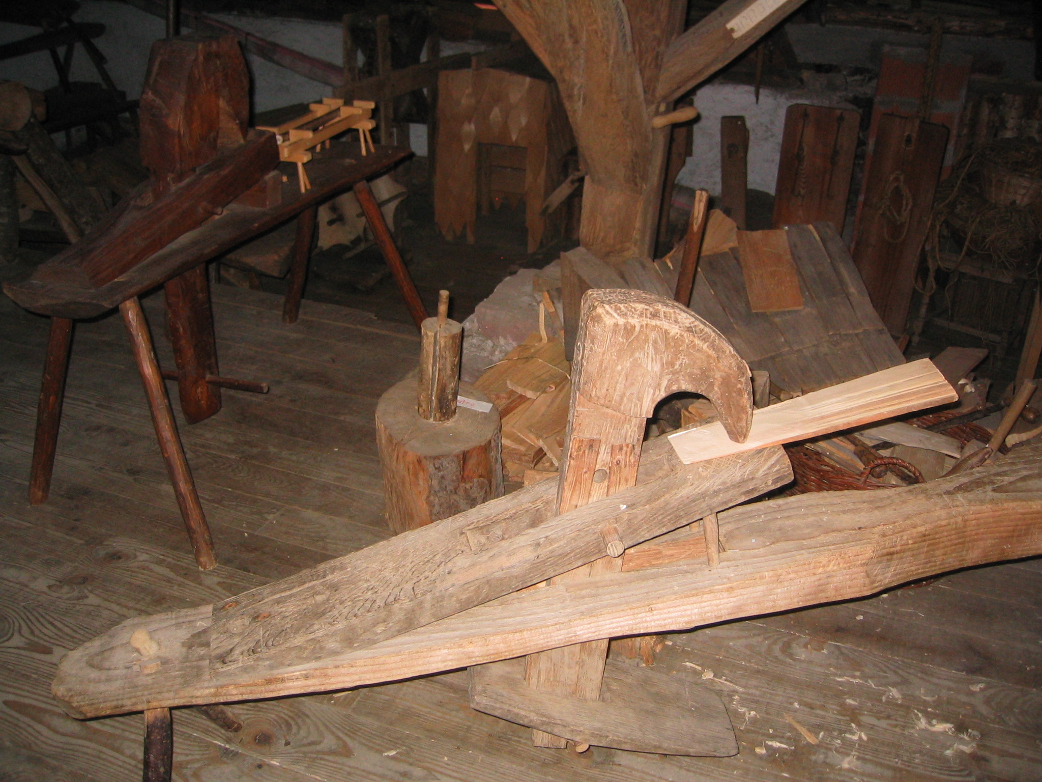 Banc d'âne pour la fabrication traditionnelle des essis (tuiles en bois) à la ferme-musée de la Soyotte (Saint-Dié-des-Vosges, France)